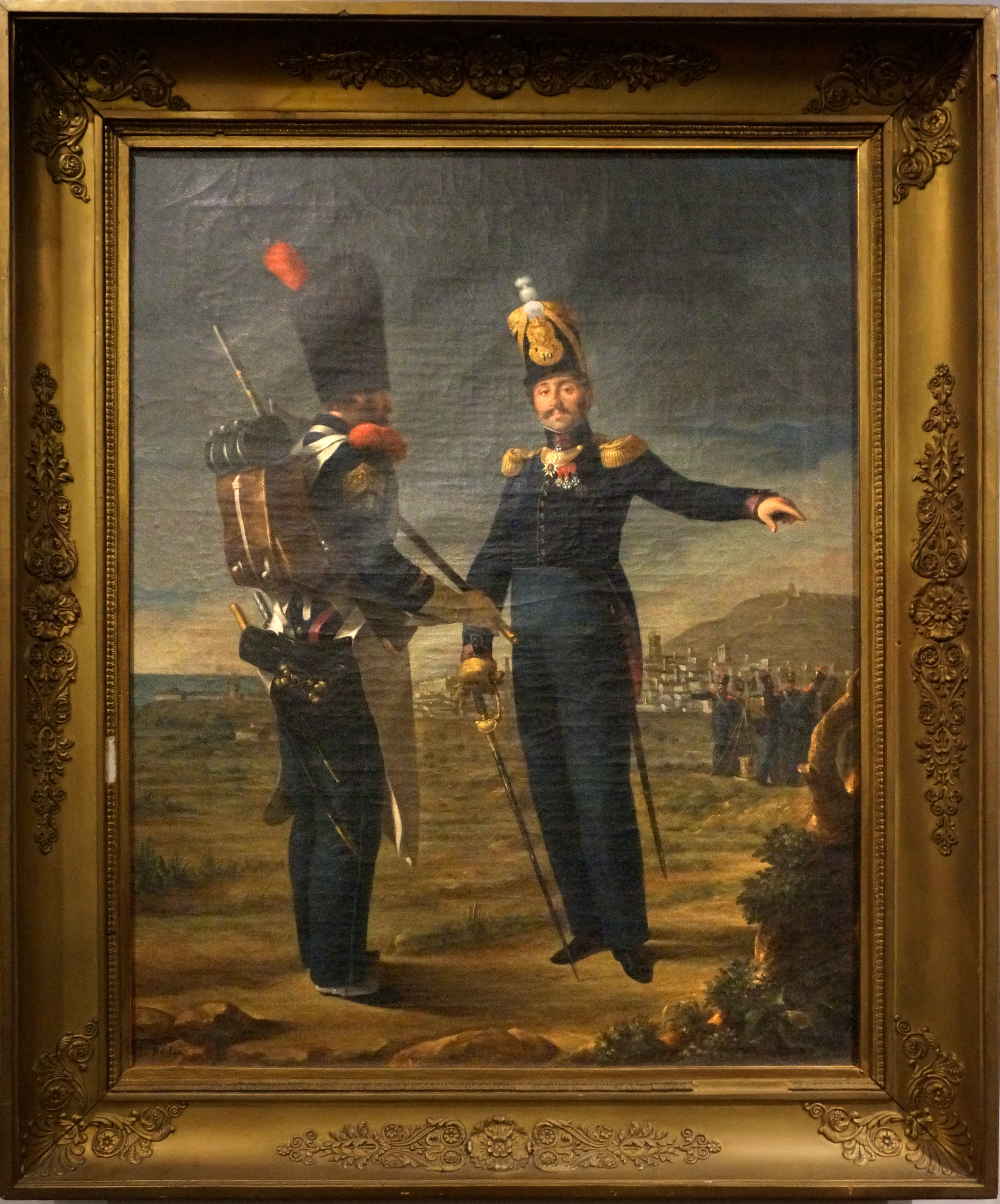 tableau au Musée de l'armée.